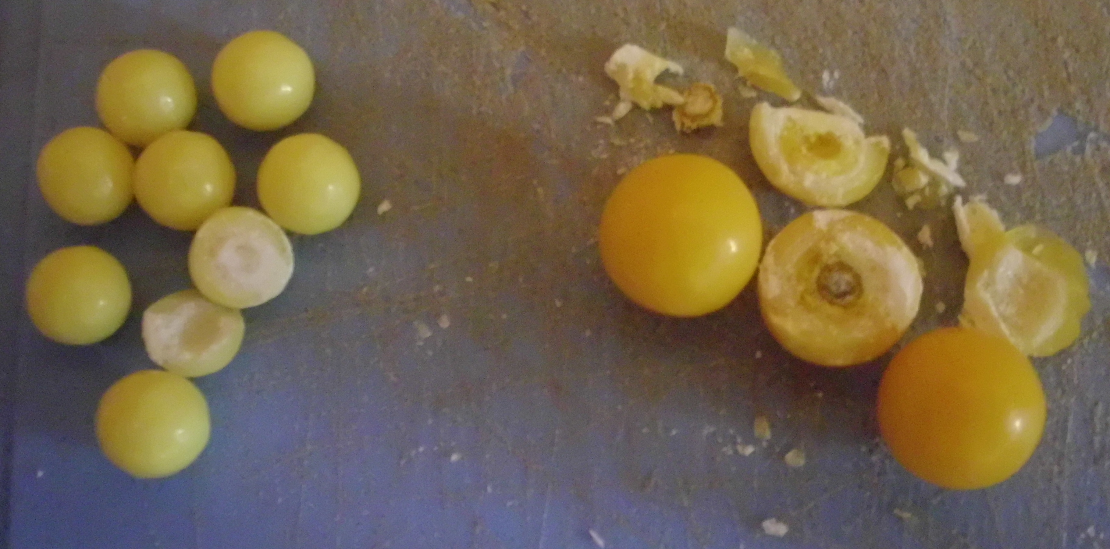 Драже с аскорбиновой кислотой (слева) и гексавитом (справа). На сколе драже видна слоистая структура.